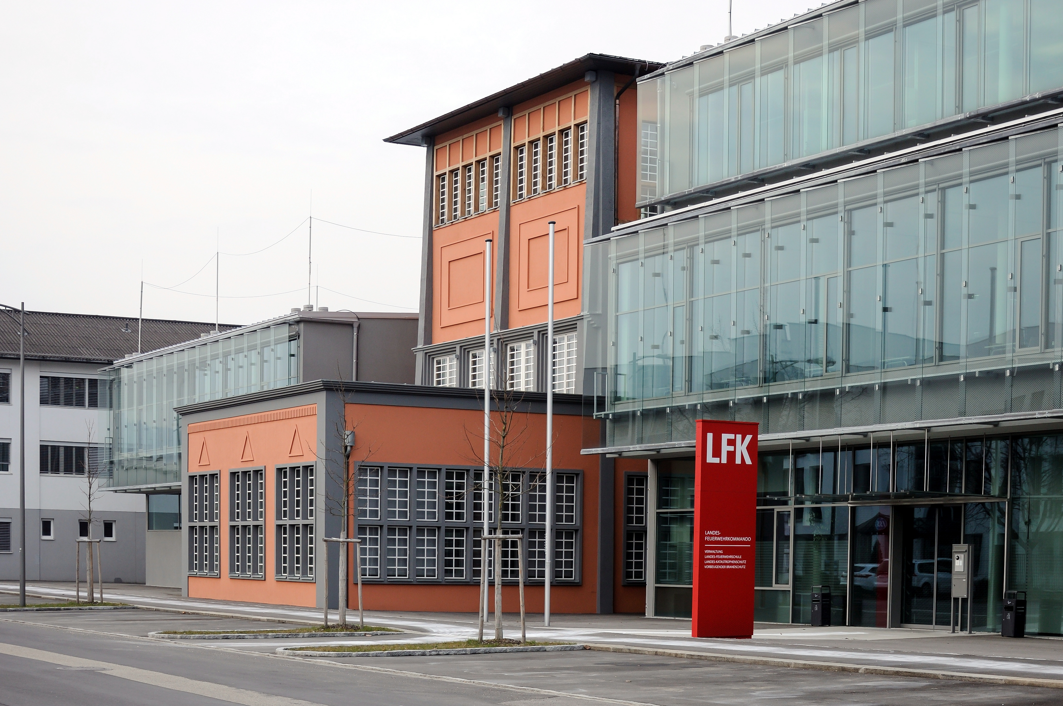 Landesfeuerwehrschule, ehem. Permanganatfabrik